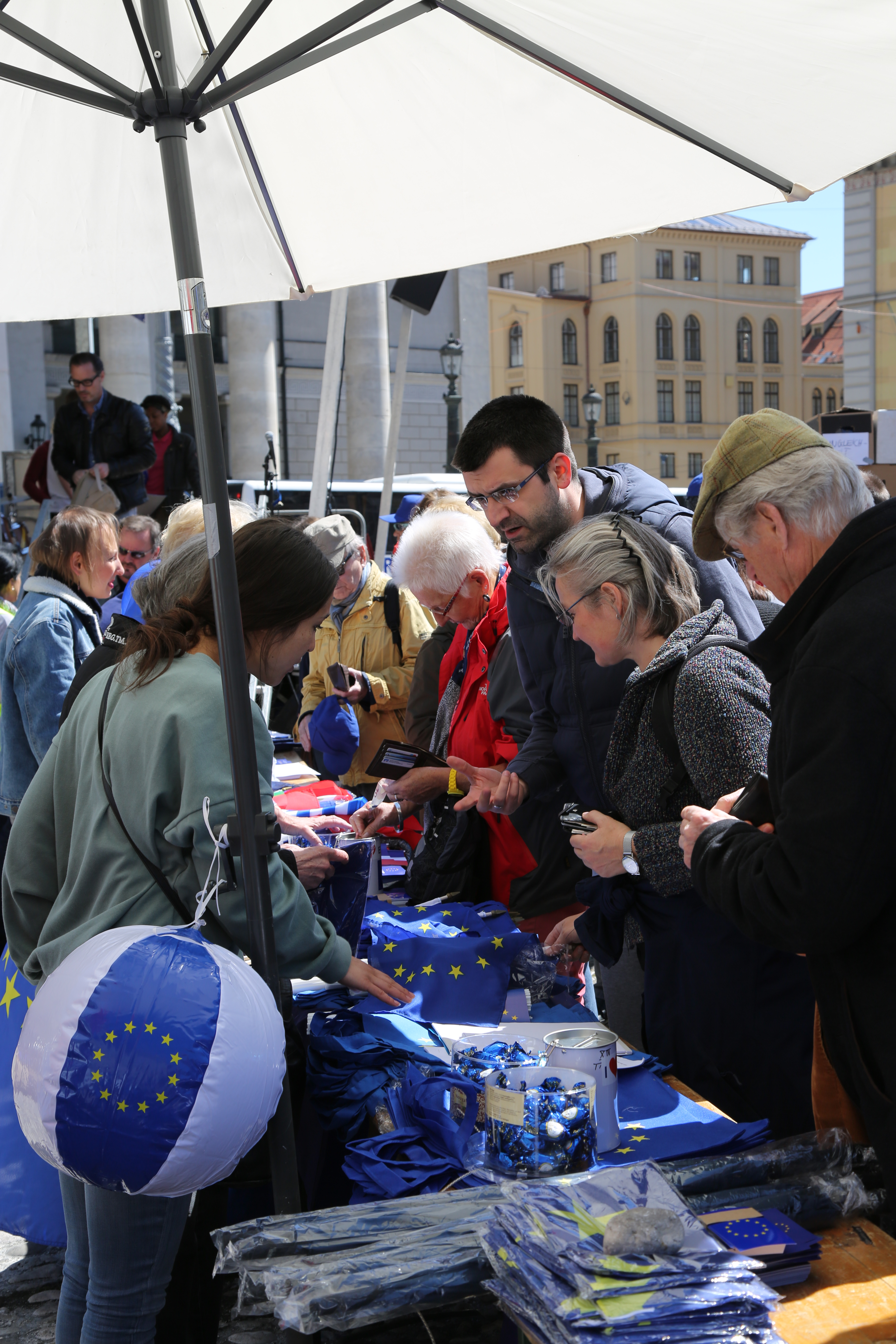 Pulse of Europe Veranstaltung am 30. April 2017 in München, Max-Joseph-Platz.